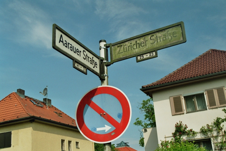 Straßenschilder im Schweizer Viertel in Berlin-Lichterfelde